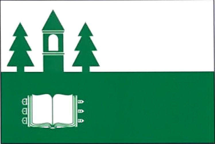 vlajka Smrček